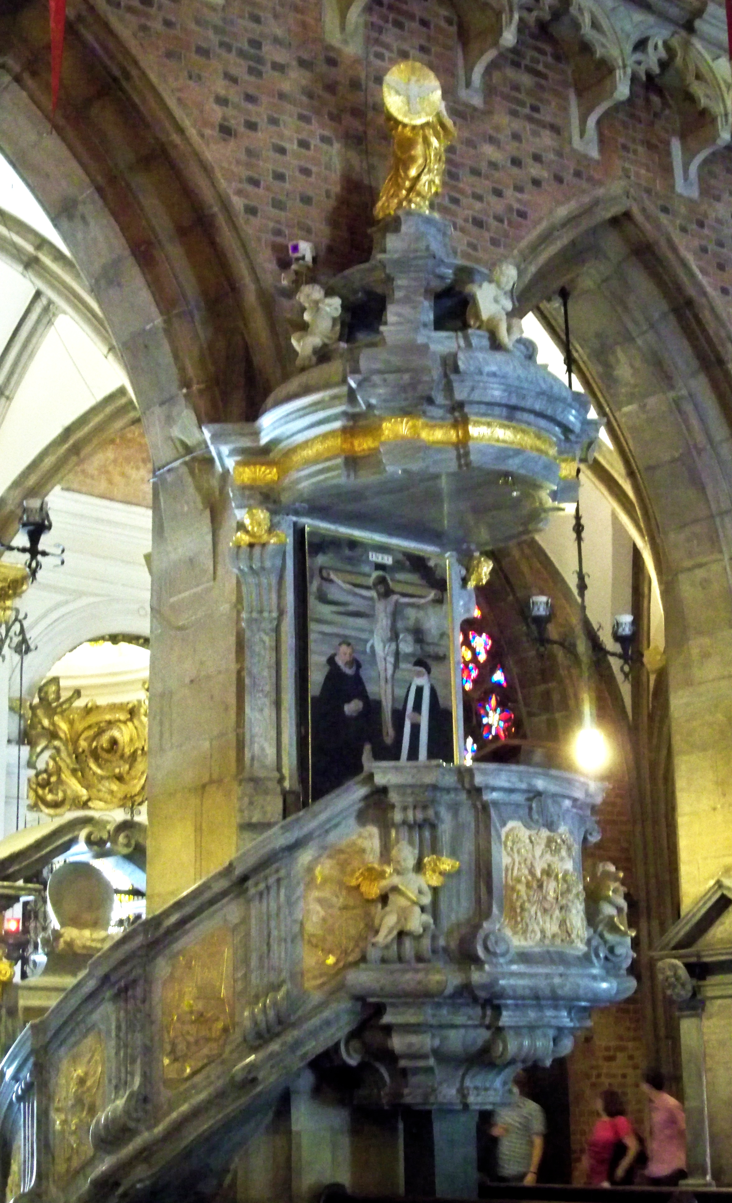 Archikatedra wrocławska.